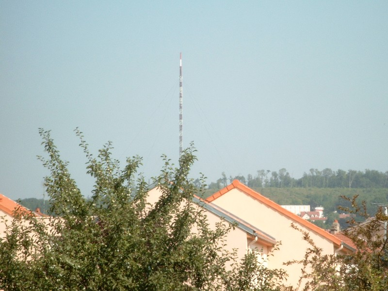 Antenne de l'entreprise TDF surplombant le plateau de Malzéville